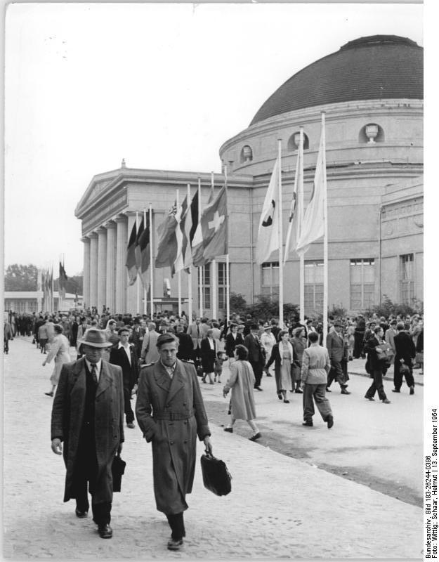 Leipzig, Messegelände, Halle 2 Zentralbild Wittig-Schaar Op-Qu 13.9.1954 Leipziger Messe 1954 Blick zur Halle II, in welcher unter anderem auch England, Frankreich, Belgien und Österreich ausstellen.